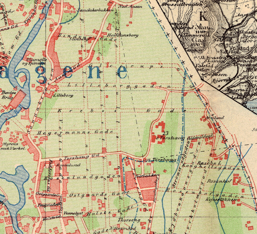 Torhov, Oslo.